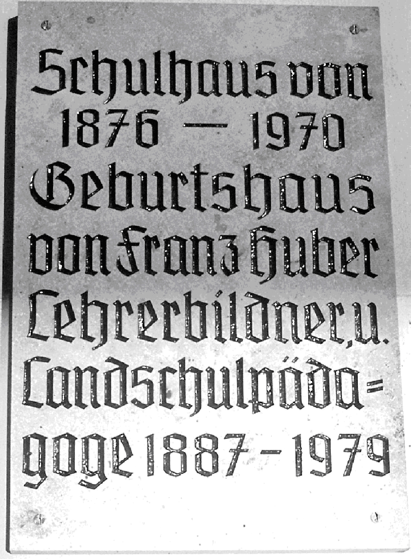 Gedenktafel für Prof. Franz Huber; memorial tablet for professor Franz Huber